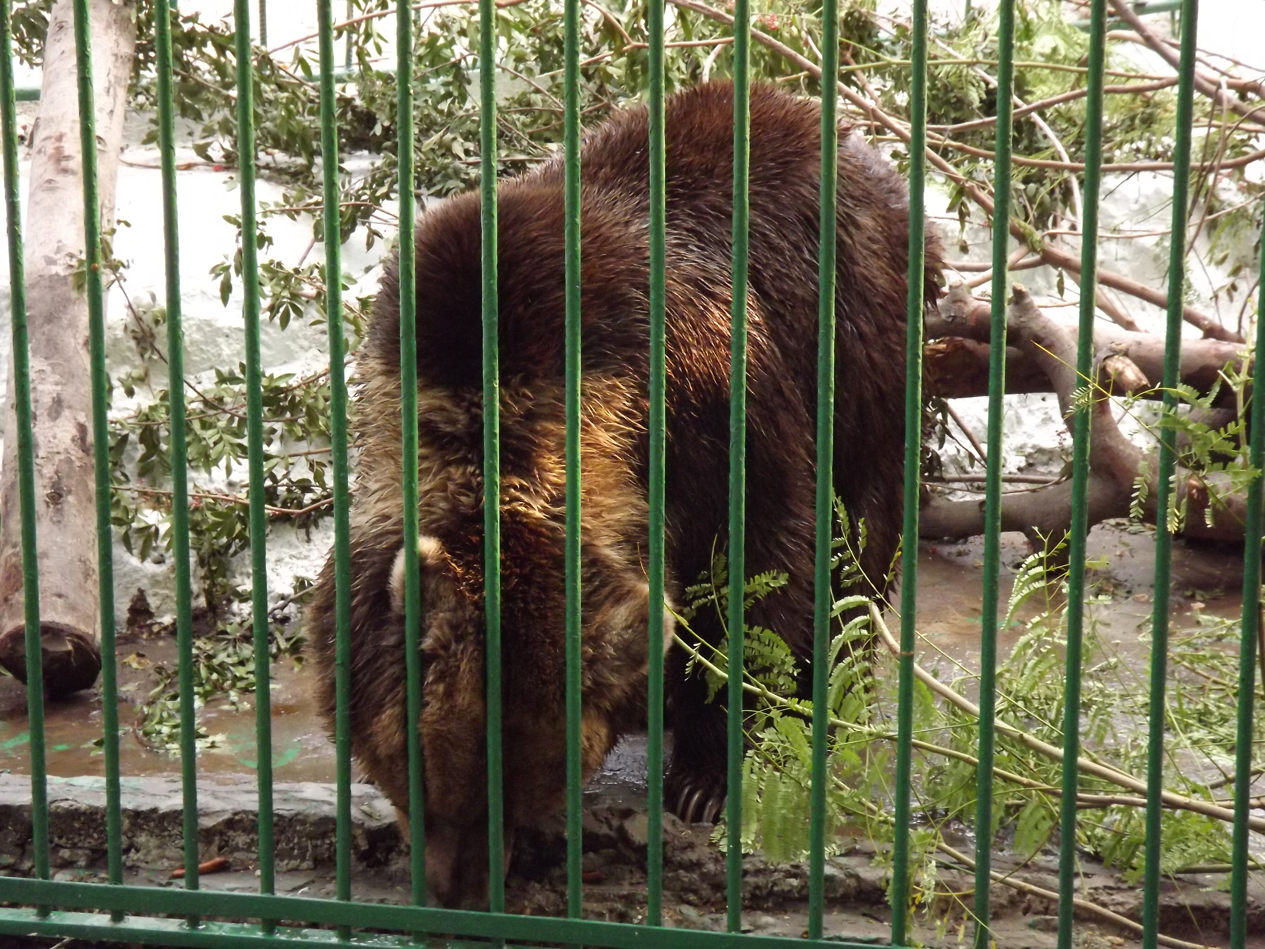 دب بني في حديقة حيوان النزهة - الاسكندرية